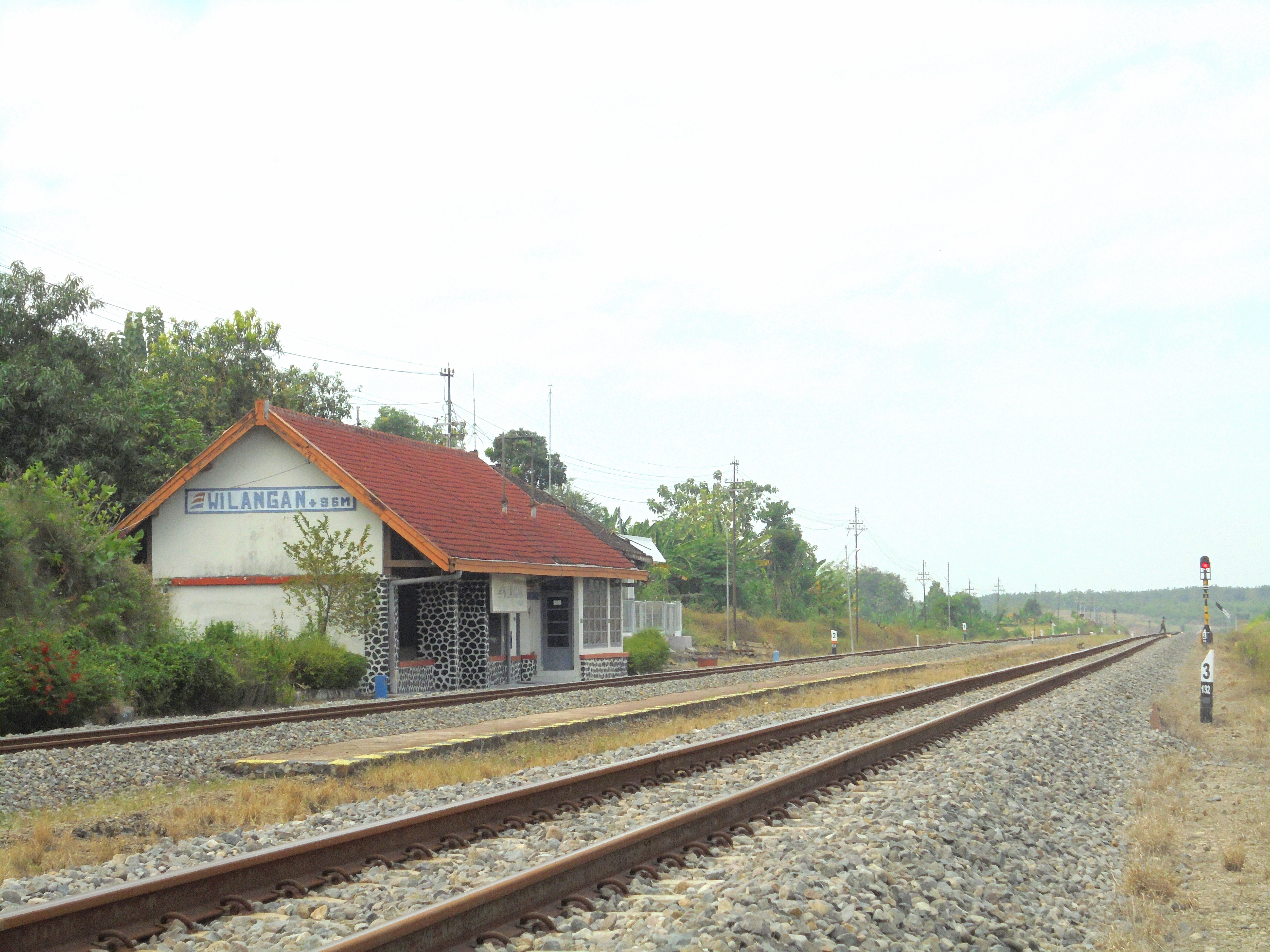 Bekas emplasemen Stasiun Wilangan, Kabupaten Nganjuk